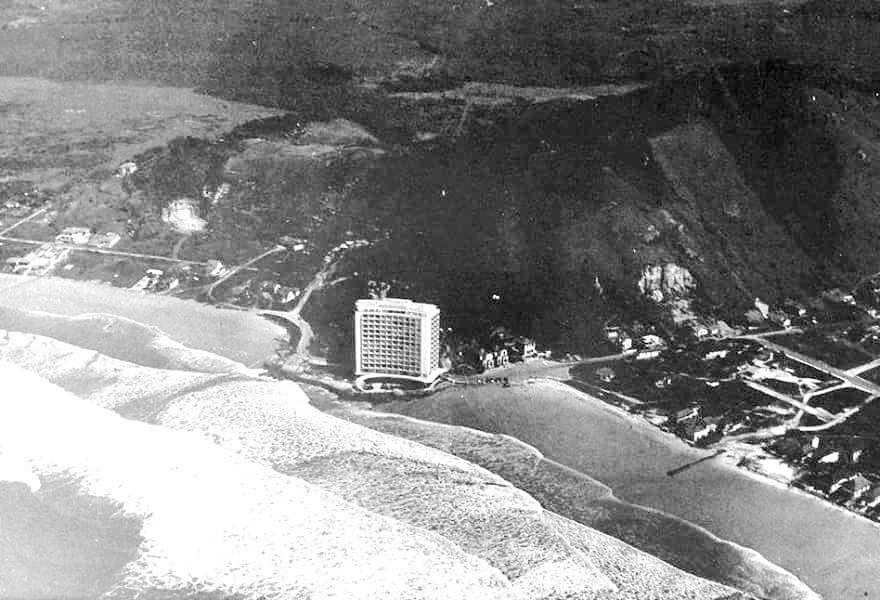 Edifício Sobre as Ondas, Guarujá O Sobre as Ondas é um edifício residencial localizado entre as praias das Pitangueiras e Astúrias, no município do Guarujá, estado de São Paulo. O projeto do edifício foi aprovado pela prefeitura em 26-10-1945. A construção começou no ano seguinte, mas a inauguração oficial deu-se apenas em 17-07-1951.